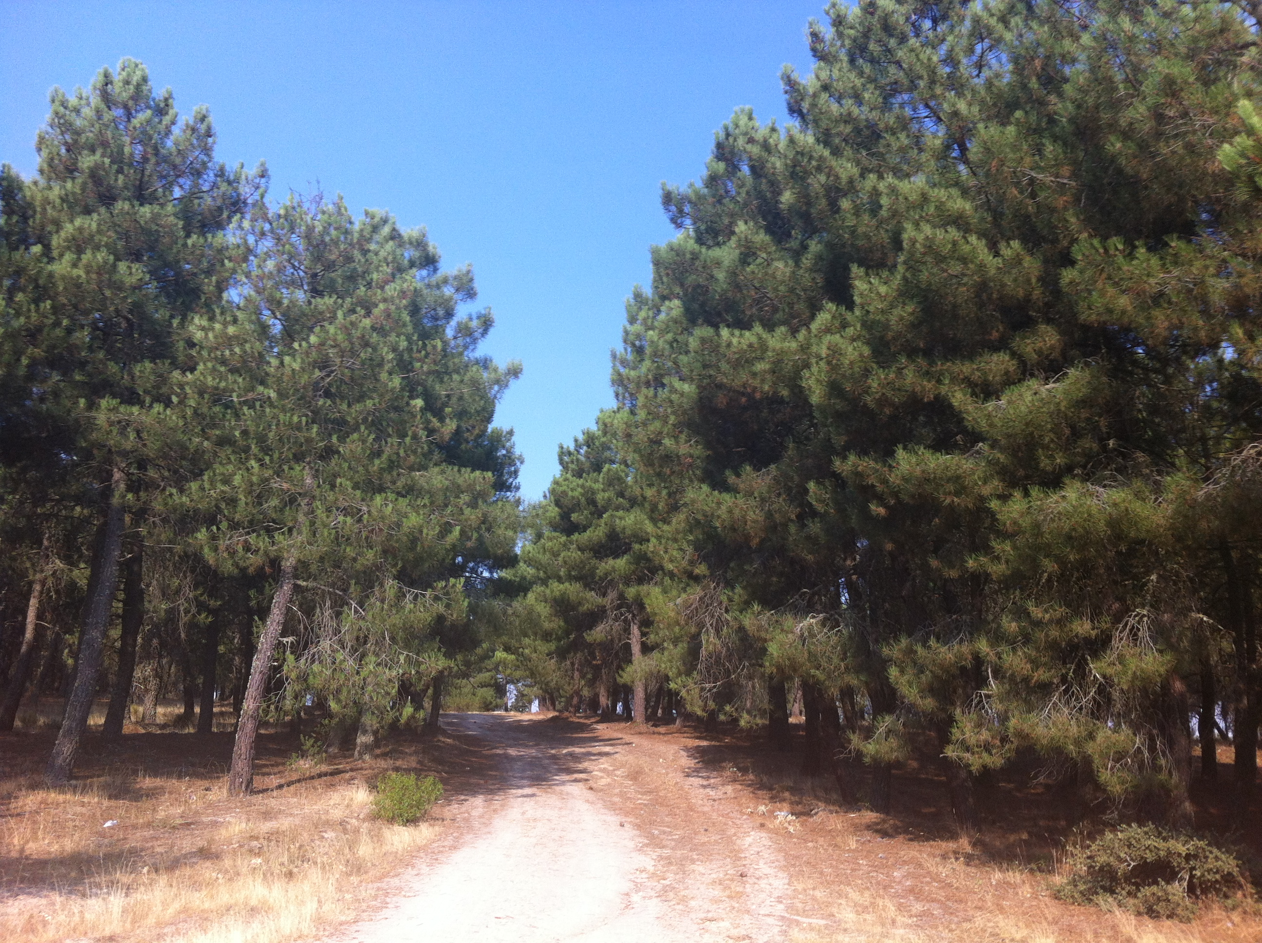 Pirar de Peñausende